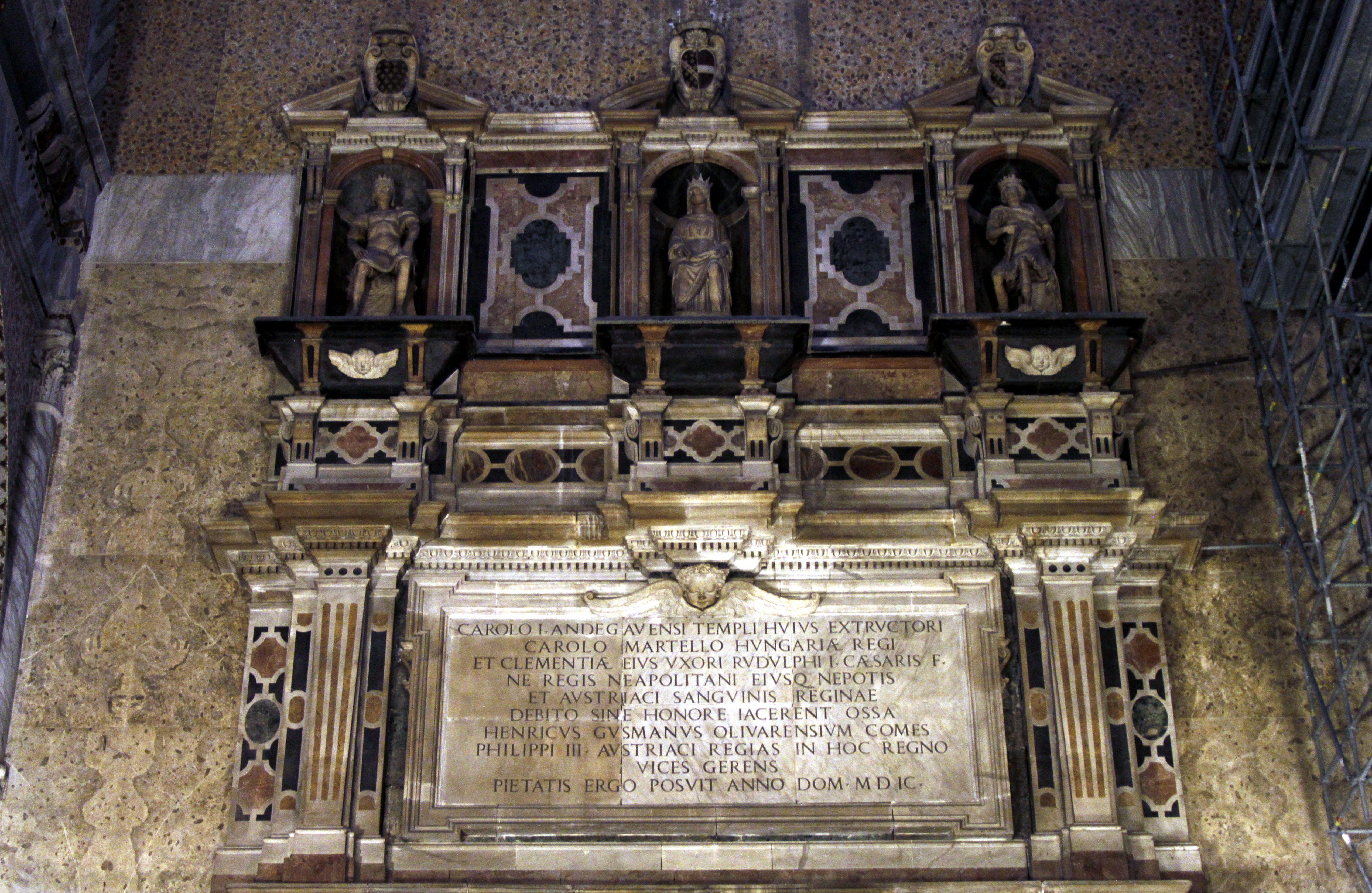 Cappella di Santa Restituta, Catedral de Nápoles